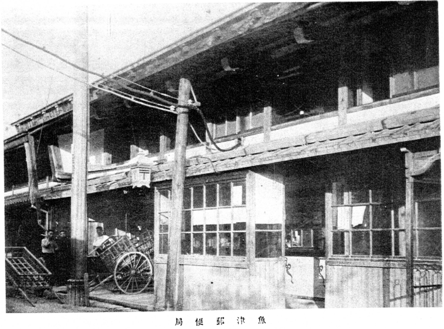 明治時代の魚津郵便局